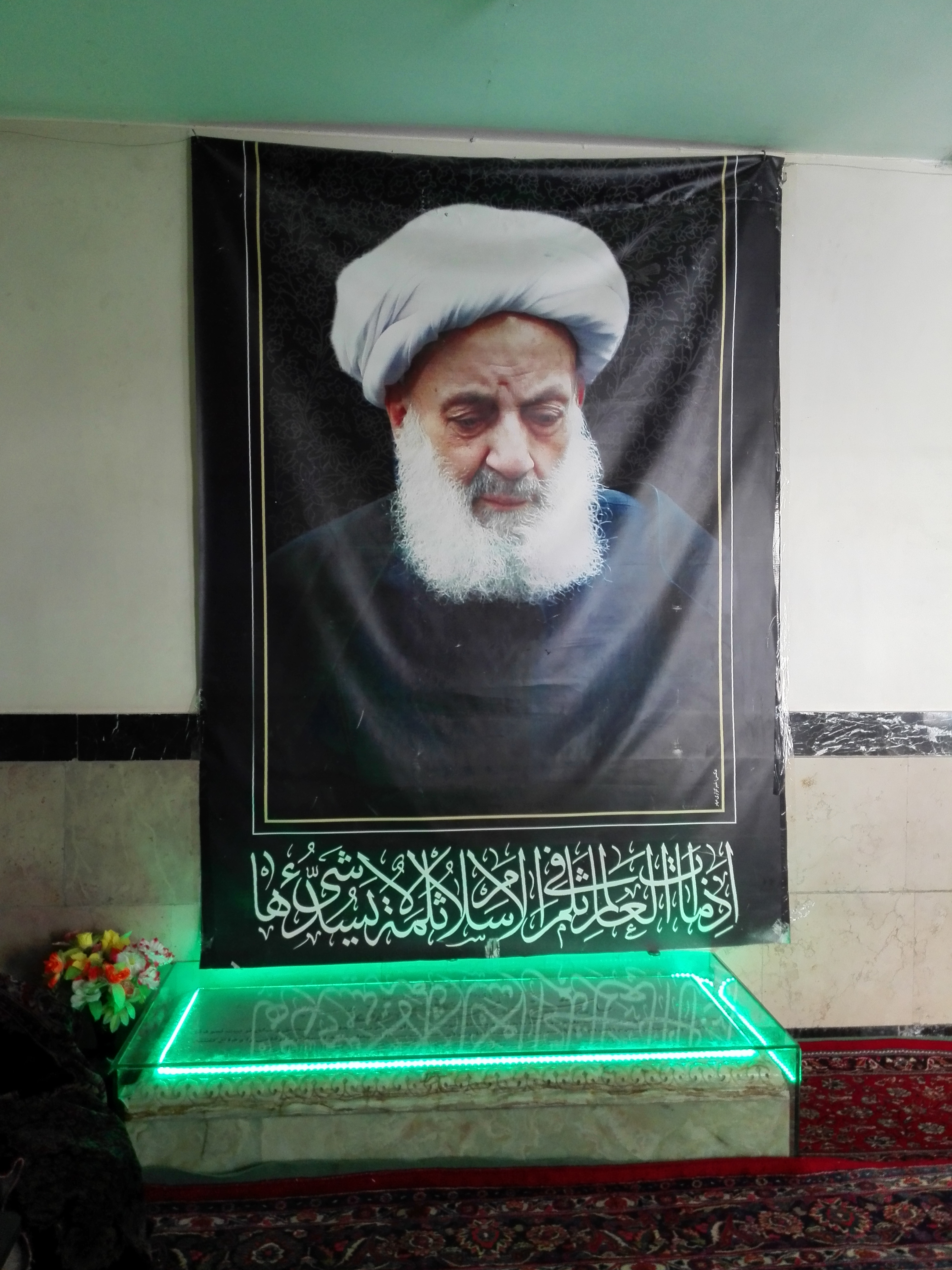 مقبره